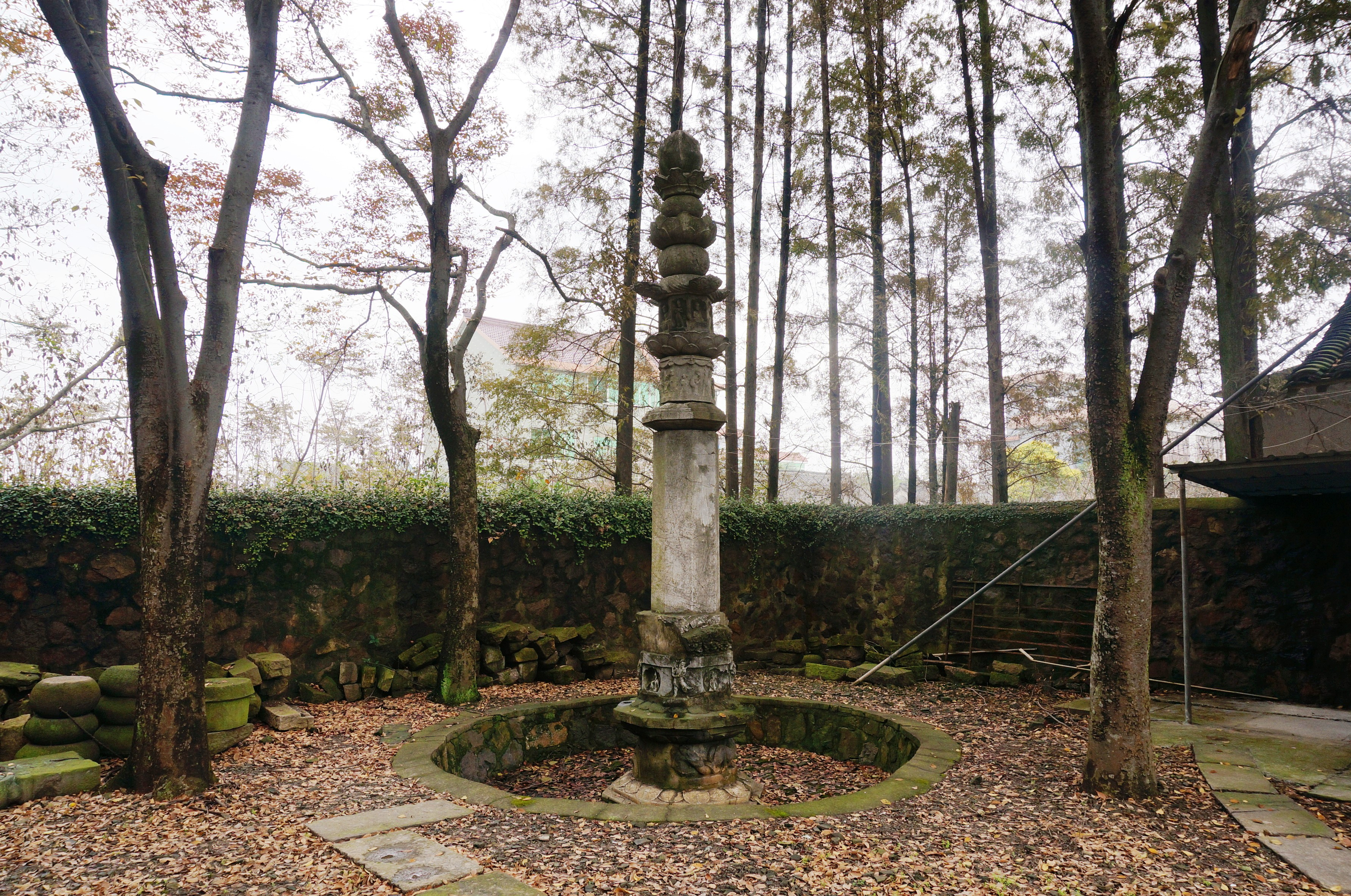 安国寺经幢，会昌四年（844）经幢西侧。